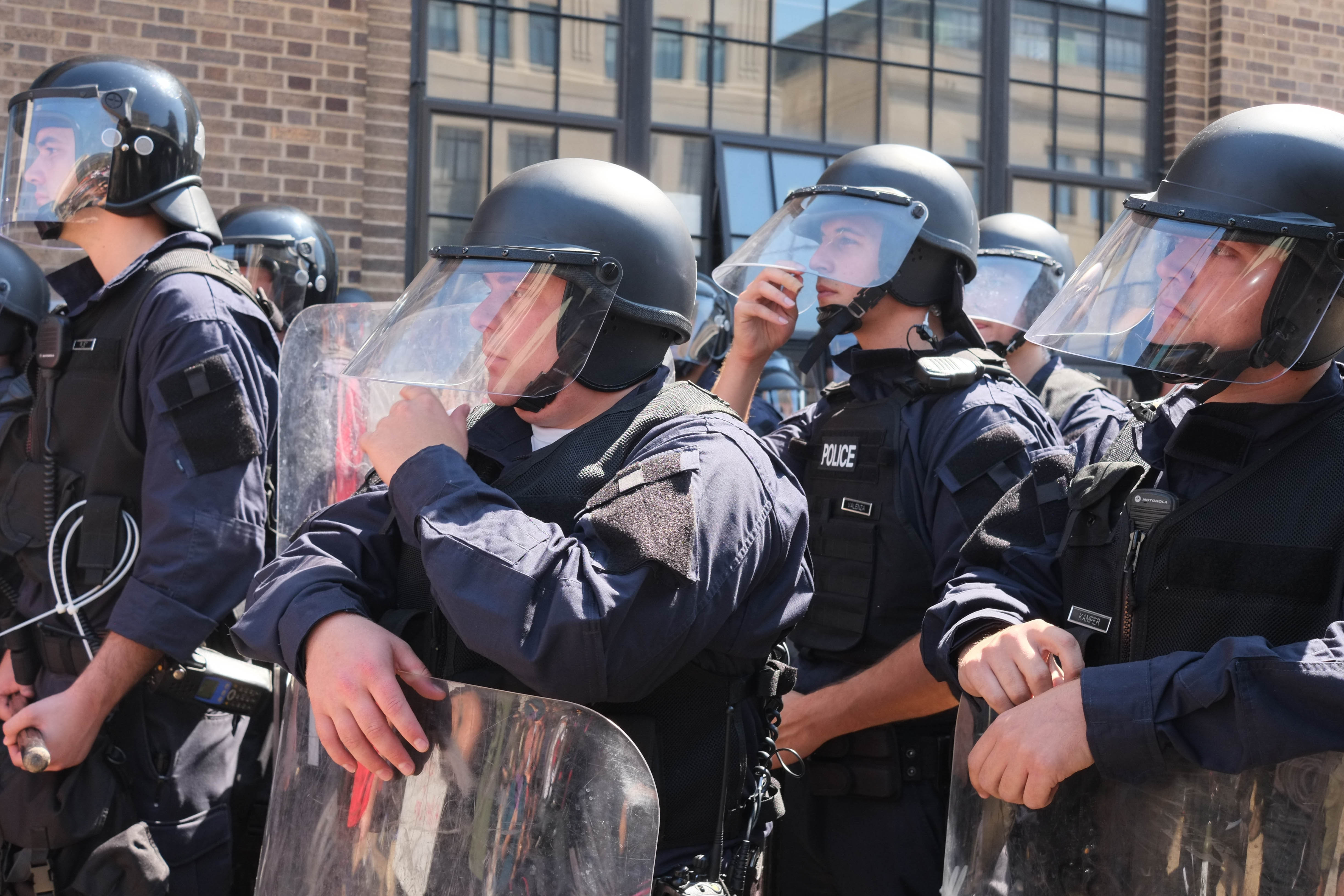 Police